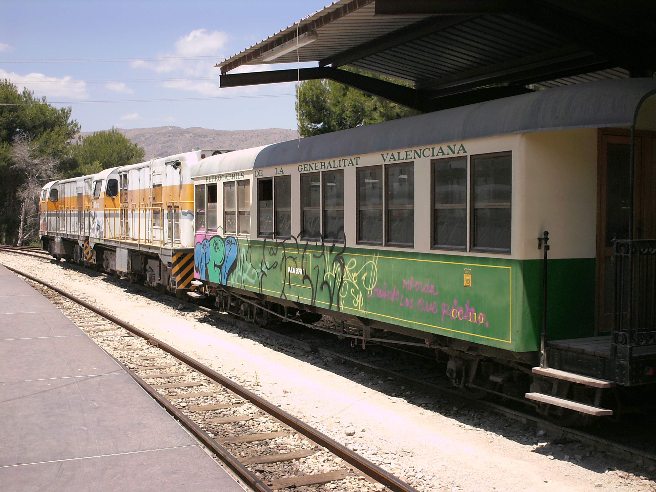 Personenwagen und zwei Lokomotiven des Limón-Exprés, im Bahnhof Benidorm abgestellt / Coche y dos locomotoras del limón exprés en la estación de Benidorm